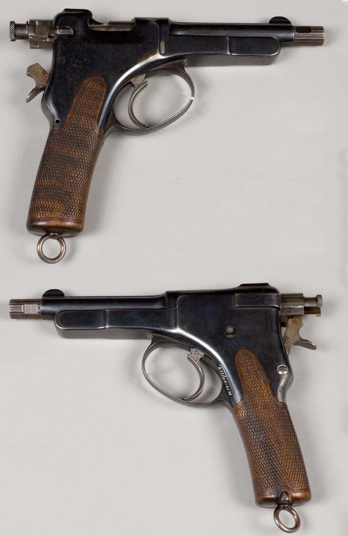 Prototip samopolnilne pištole Roth-Krnka M1895, ki jo je razvil čeh Karel Krnka.